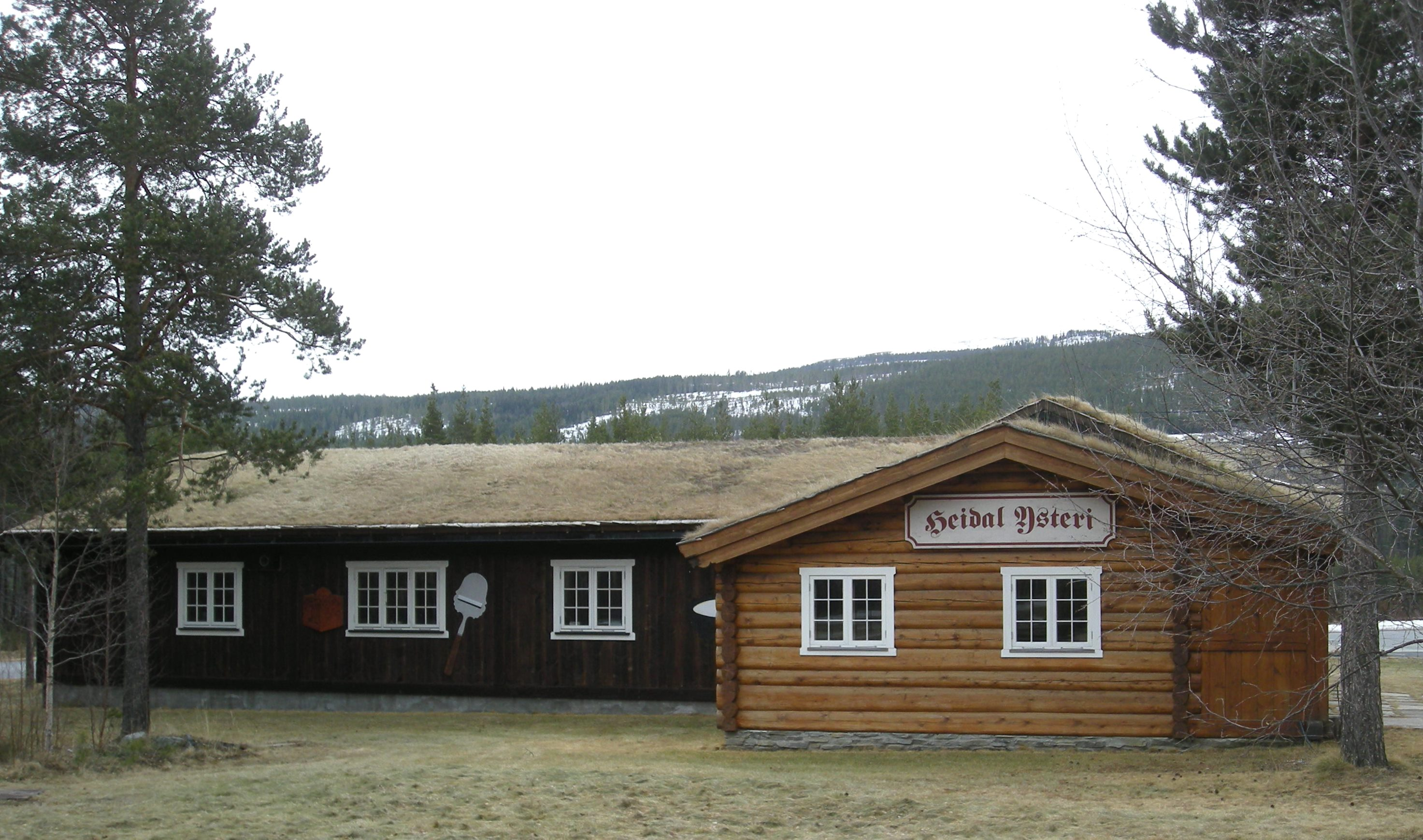 Heidal ysteri